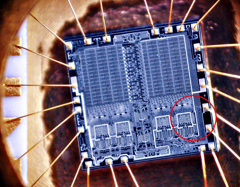 Detail křemíkového čipu o velikosti cca 3 x 3mm z paměti EPROM